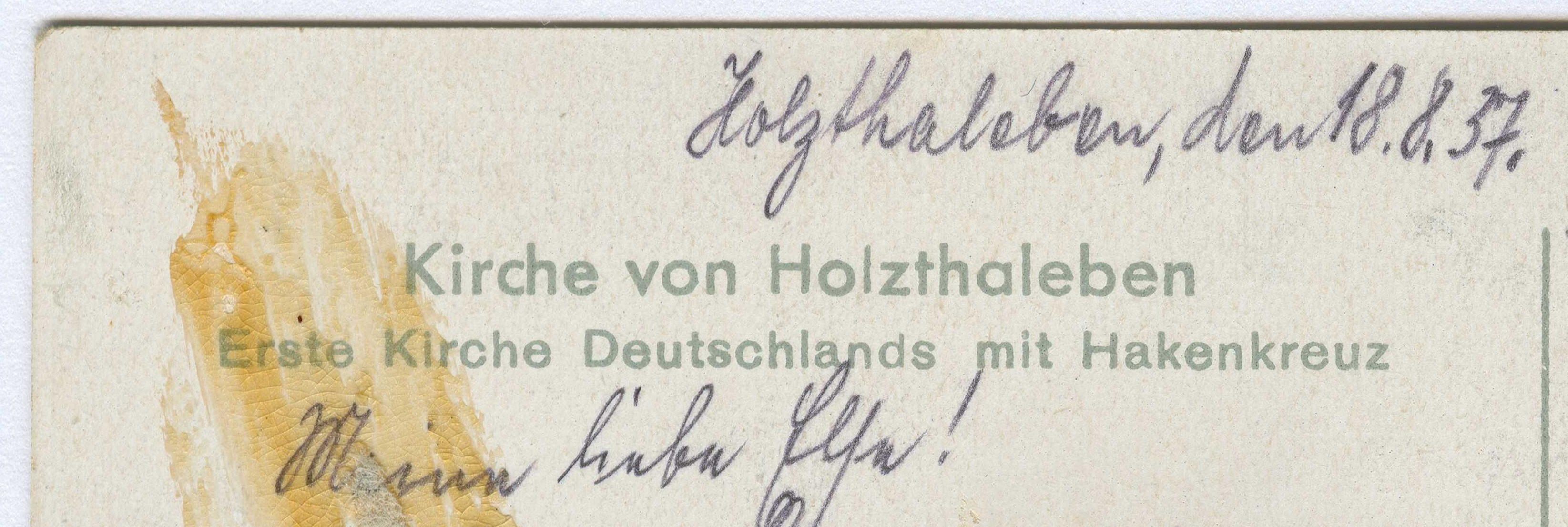 Beschriftung einer Kirchenpostkarte von 1937